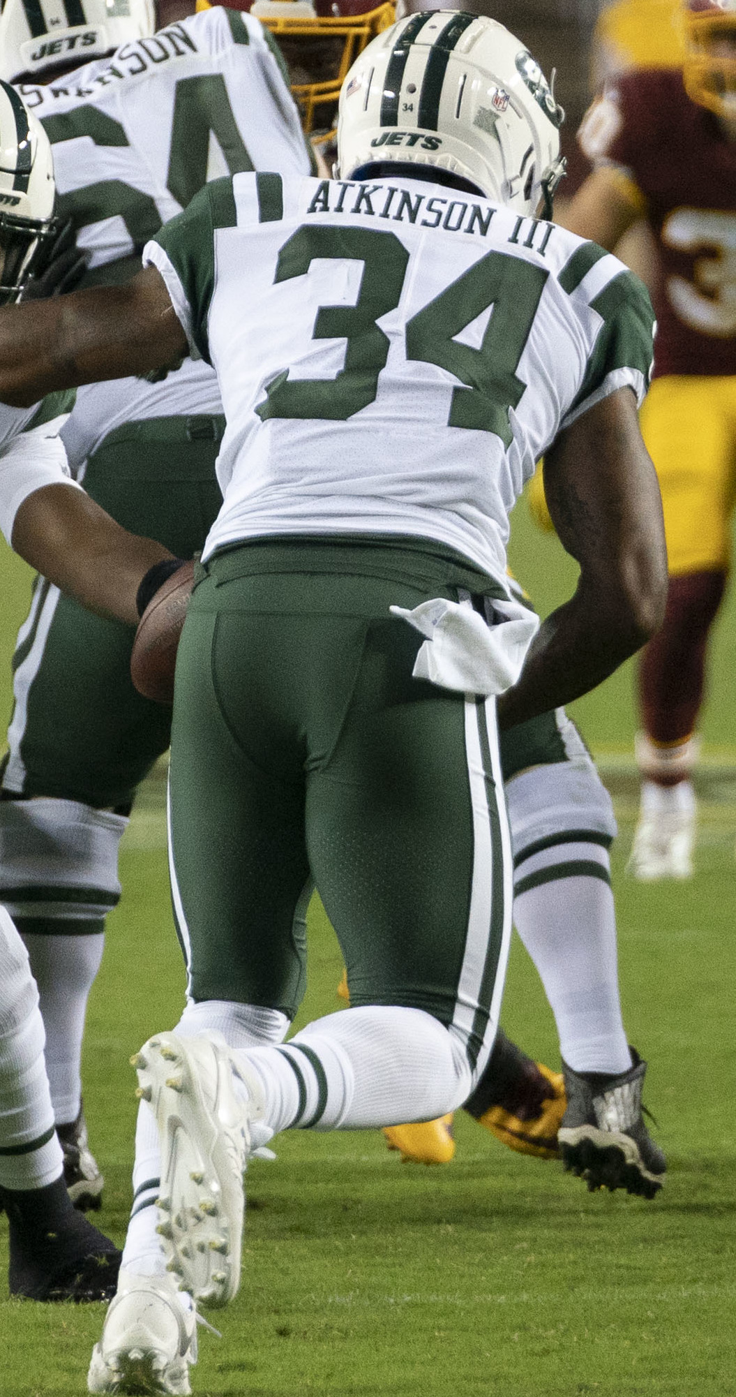 Jets at Redskins 8/16/18